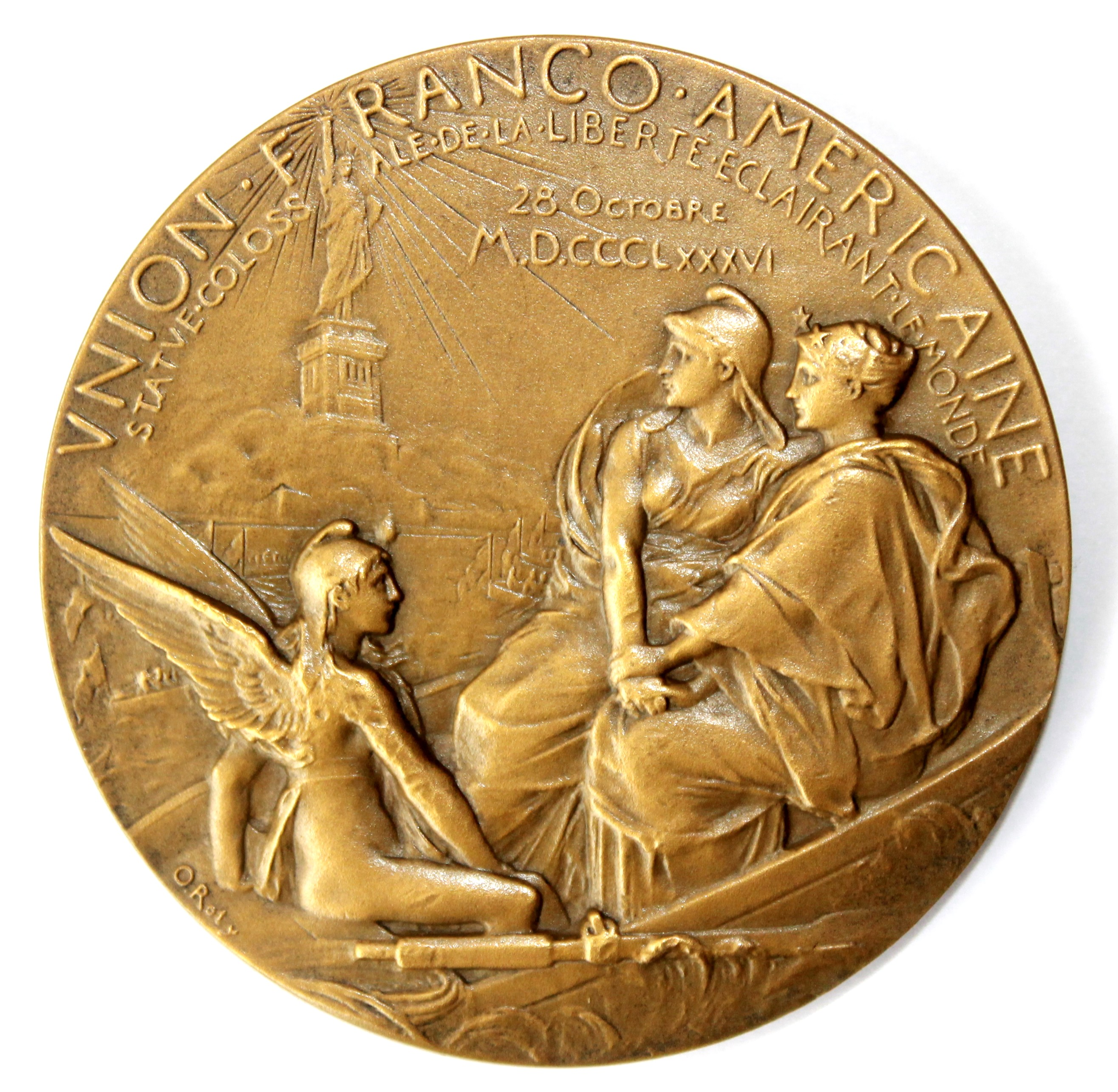 Union Franco-Américaine, médaille en bronze (68mm) avers, réalisée en 1886 par Oscar Roty. Statue colossale de la Liberté éclairant le Monde, 28 octobre 1886. La France et l'Amérique se tenant la main dans une barque devant la Statue de la Liberté.